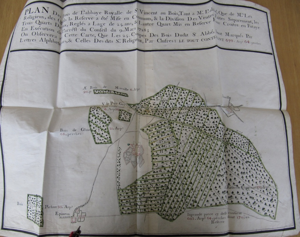 Ceci est une photo que j'ai prise aux archives départementales de l'Eure et Loir avec l'accord et la présence d'une salariée des archives.